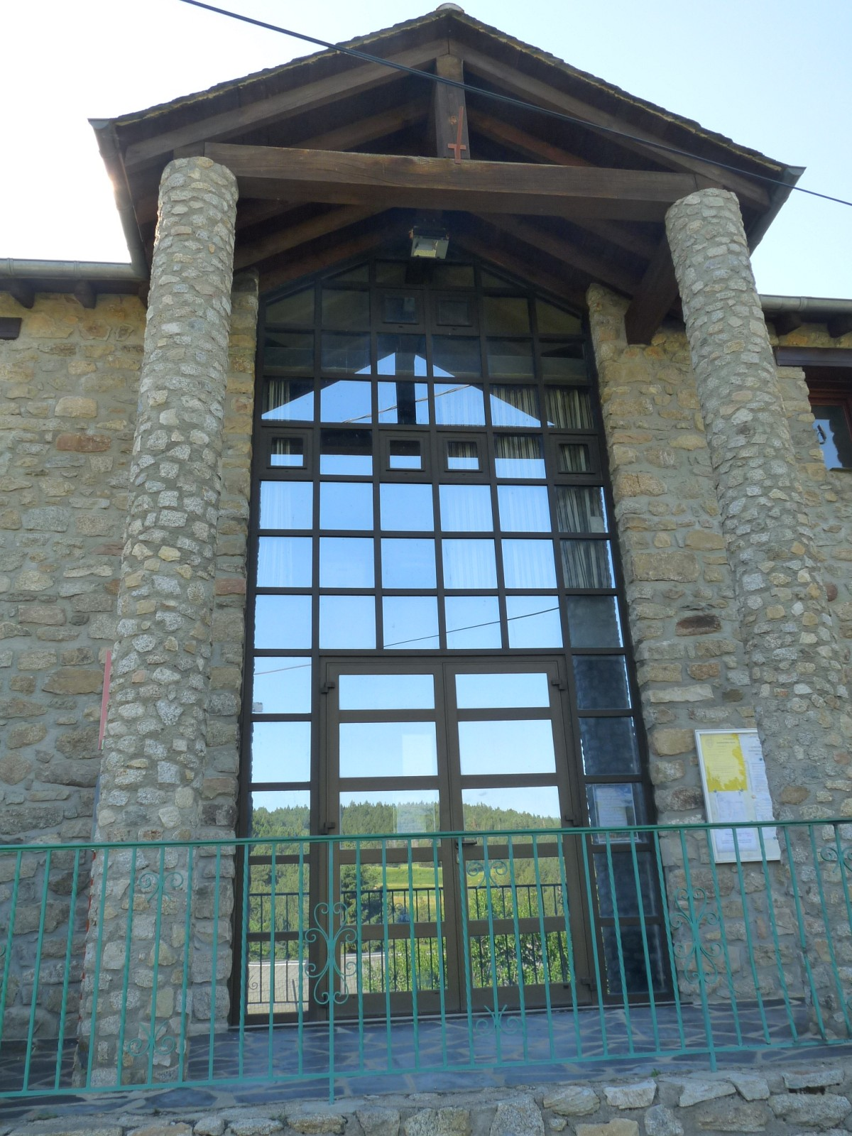 Mairie de Caudiès-de-Conflent, Pyrénées-Orientales, France